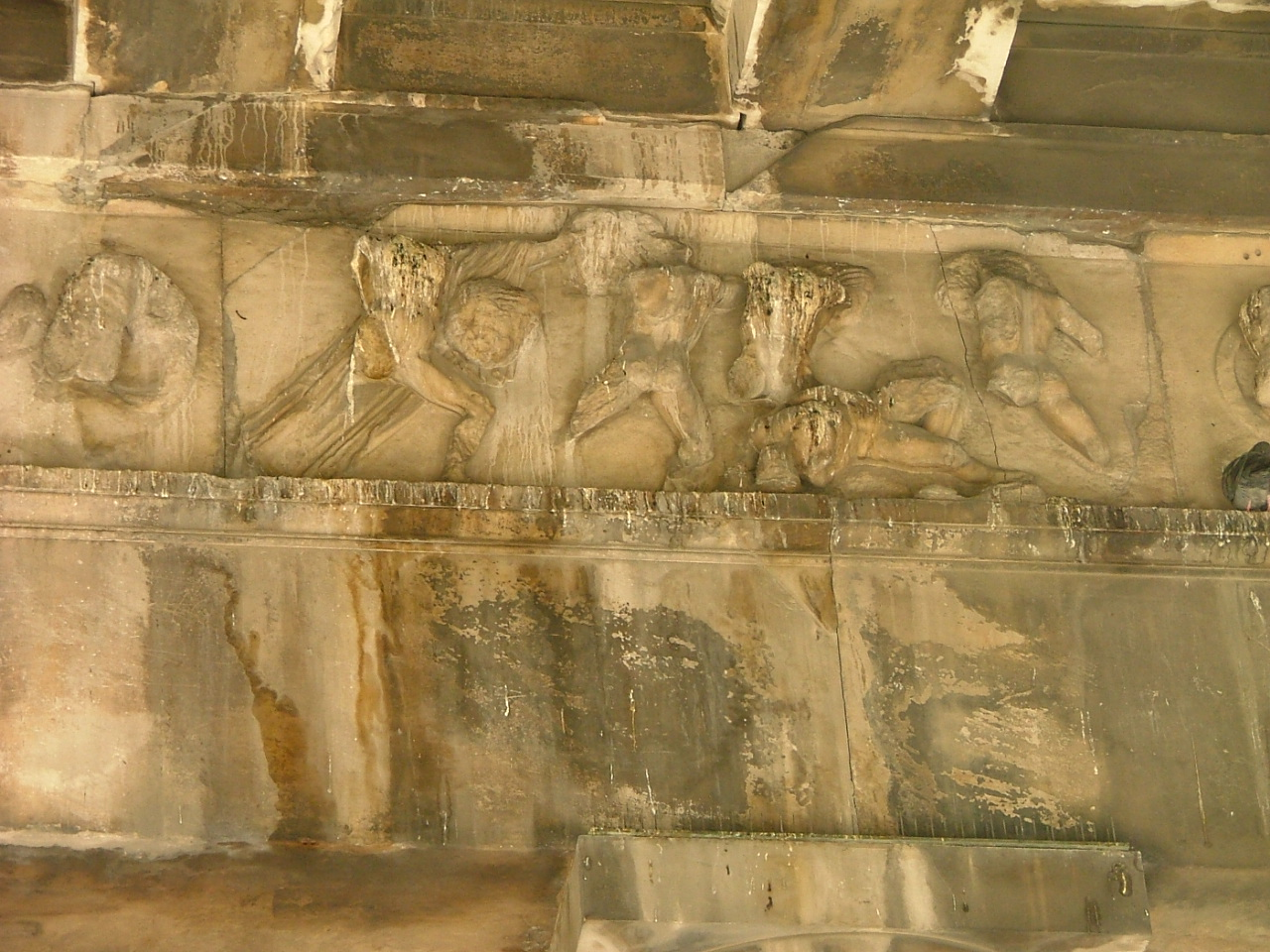 Friso del Templo de Hefesto en el Ágora de Atenas.